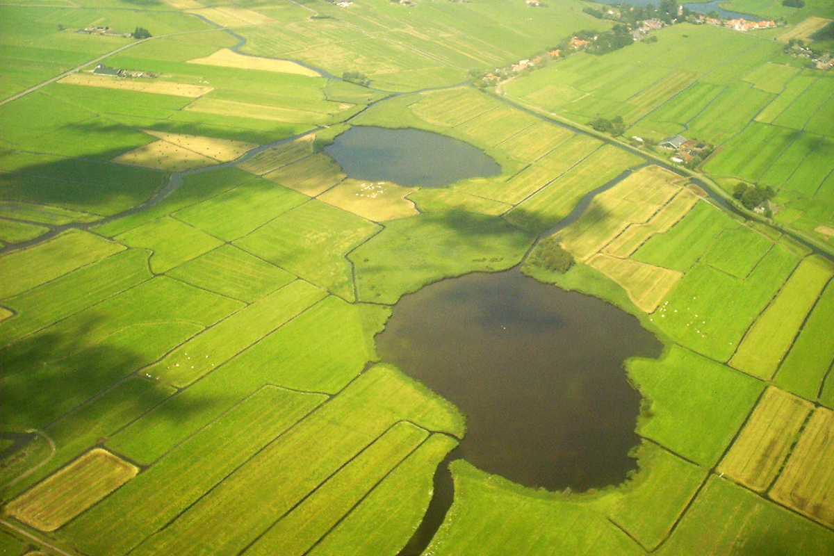 Kleine Meer en Groote Meer near Zuiderwoude in Waterland, Netherlands